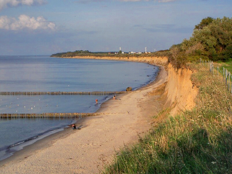 Steilküste zwischen Nienhagen und Elmenhorst, Landschaftsschutzgebiet „Kühlung“